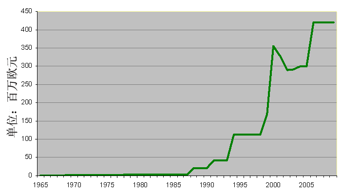 Entwicklung der Fernsehgelder der Fußball-Bundesliga